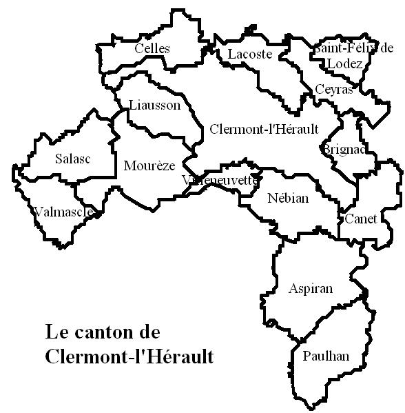 Le canton de Clermont l'Hérault Image personnelle